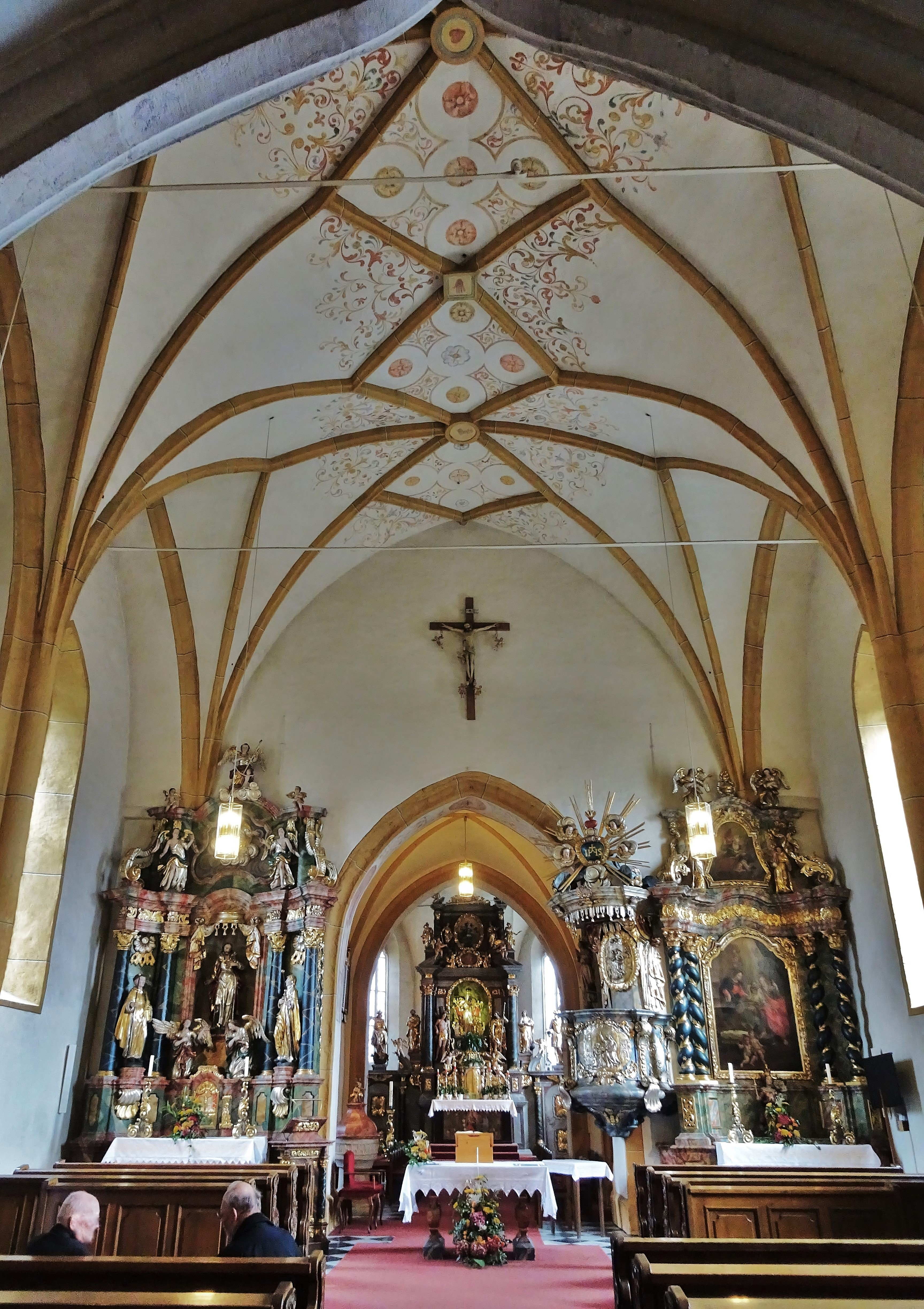 Kath. Pfarrkirche Zu Unserer Lieben Frau, Maria Gail, Innenansicht